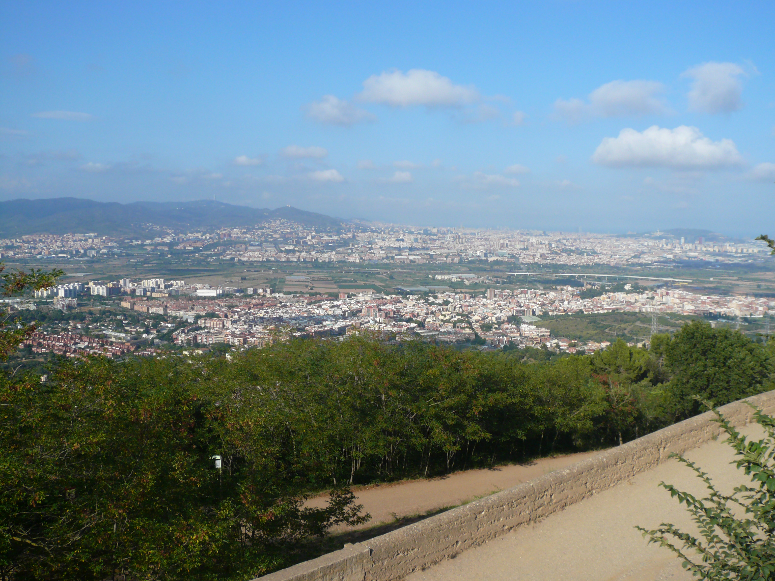 Vista des de l'ermita de Sant Ramon, al cim del Montbaig (Sant Boi de Llobregat).